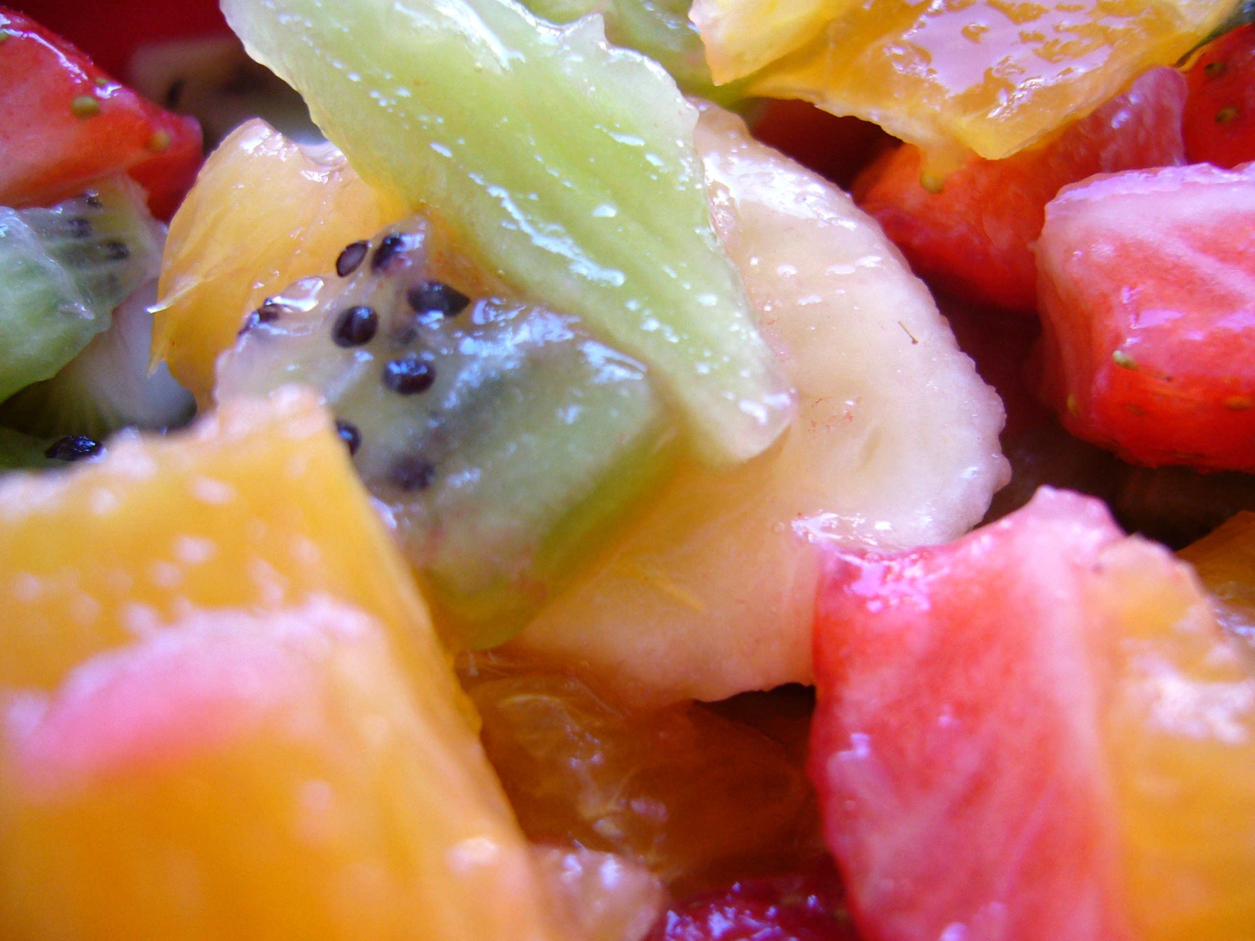 Fruit salad, seen close up.